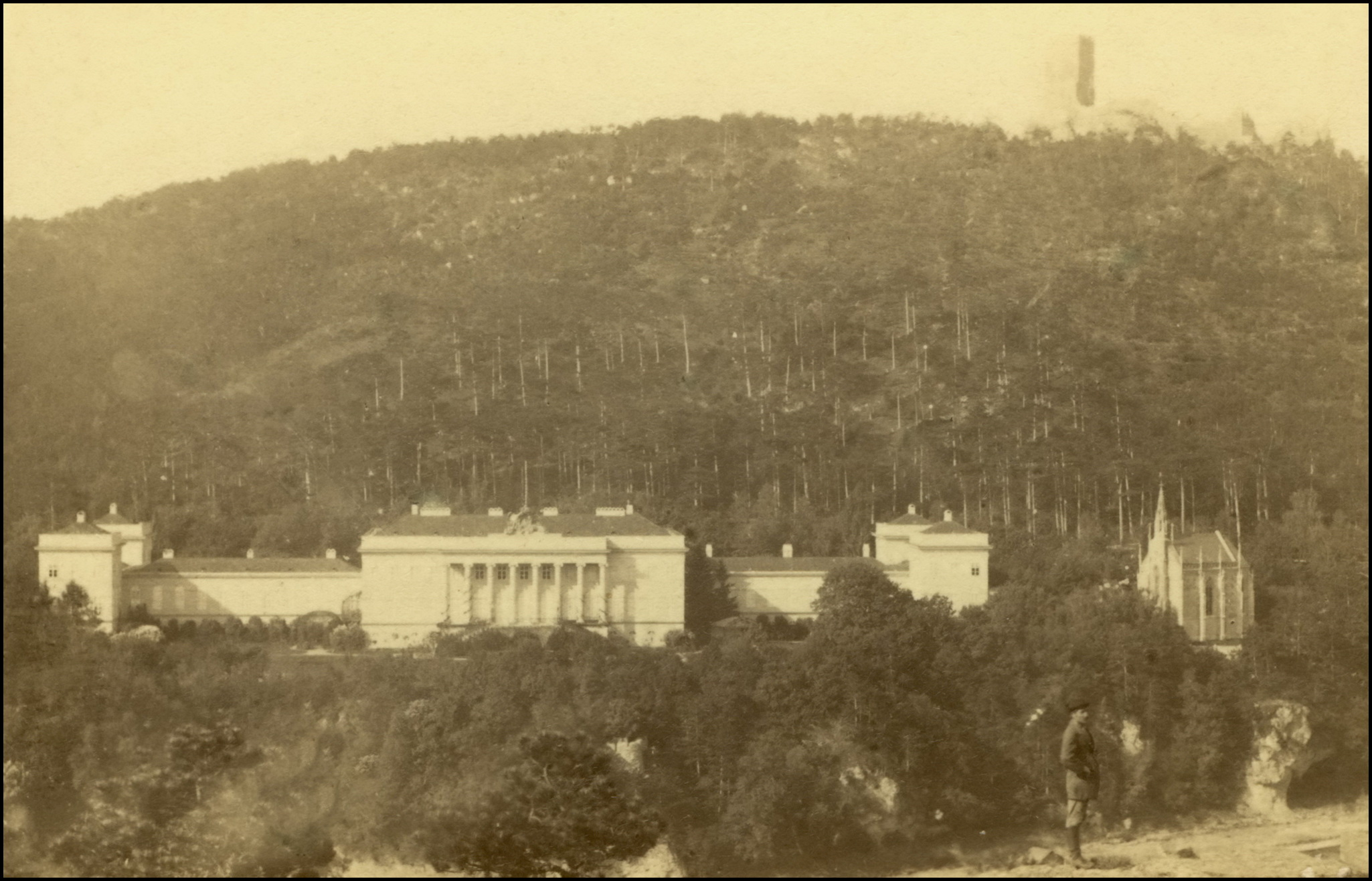 Schloss Weilburg bei Baden 1888.